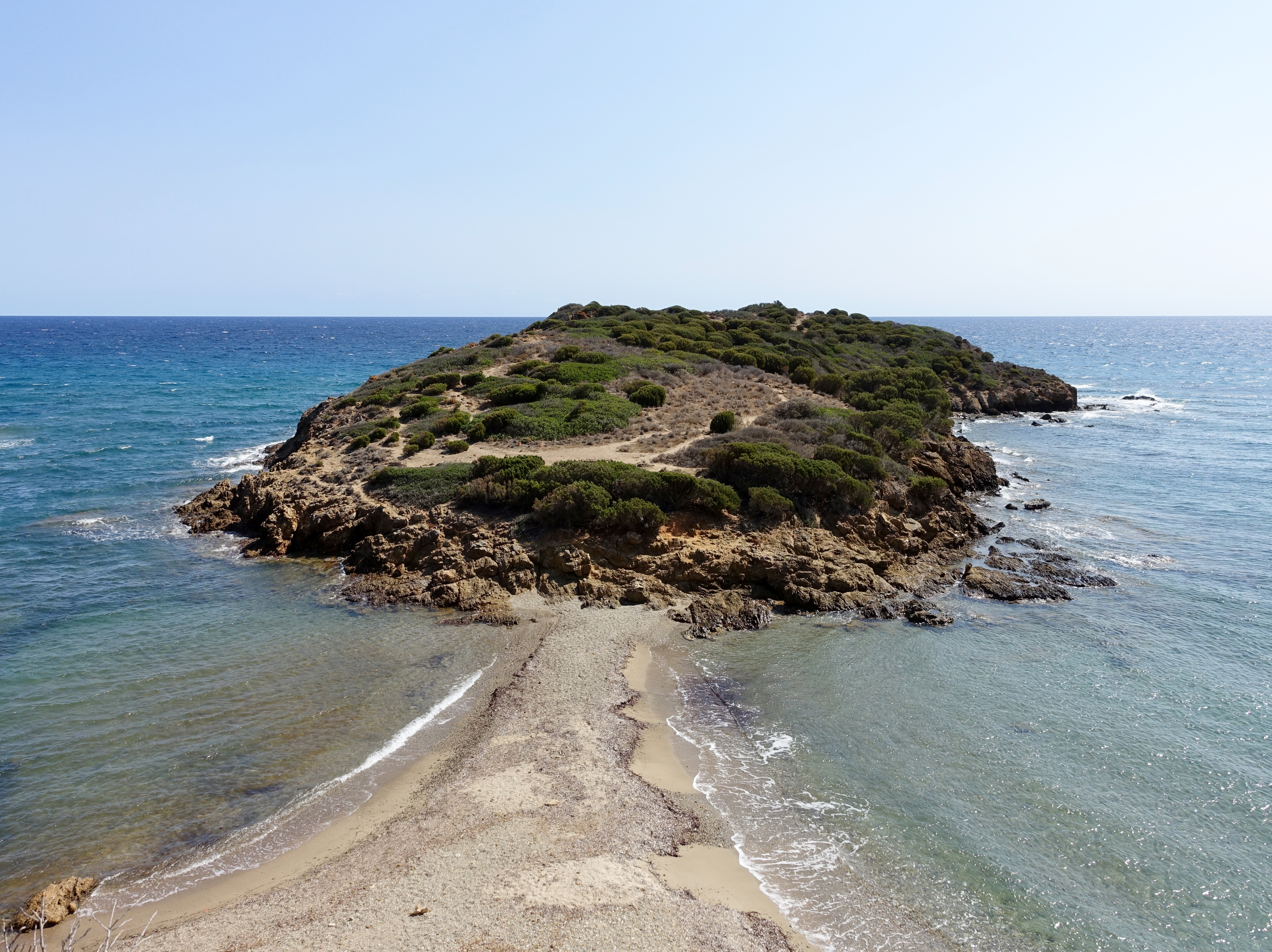 Insel Su Cardolinu (Isola Su Cardolinu), Gemeinde Domus de Maria, Sardinien, Italien